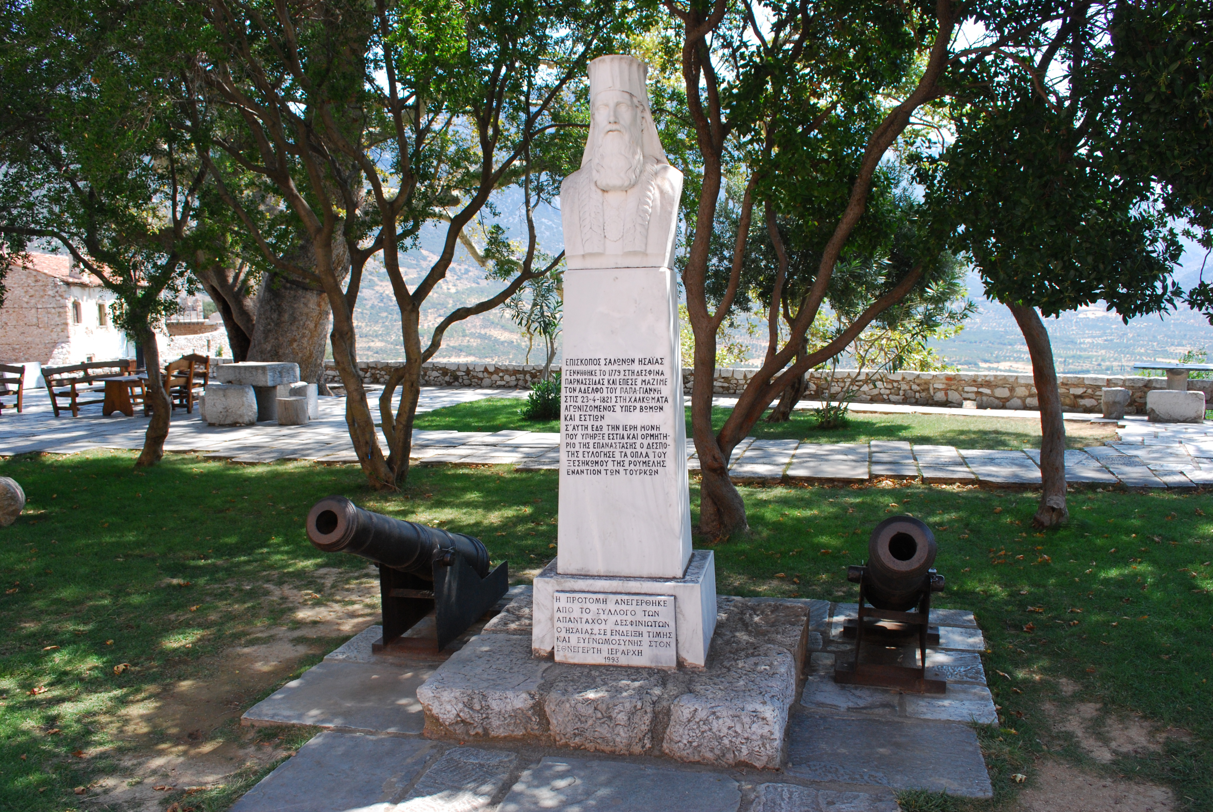 Vue du monastère d'Hosios Loukas.